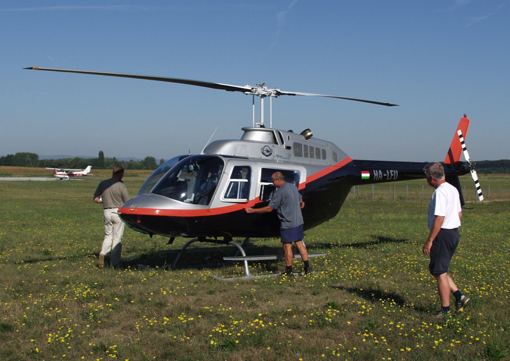 Bell 206 Jet Ranger helikopter, Fertőszentmiklós